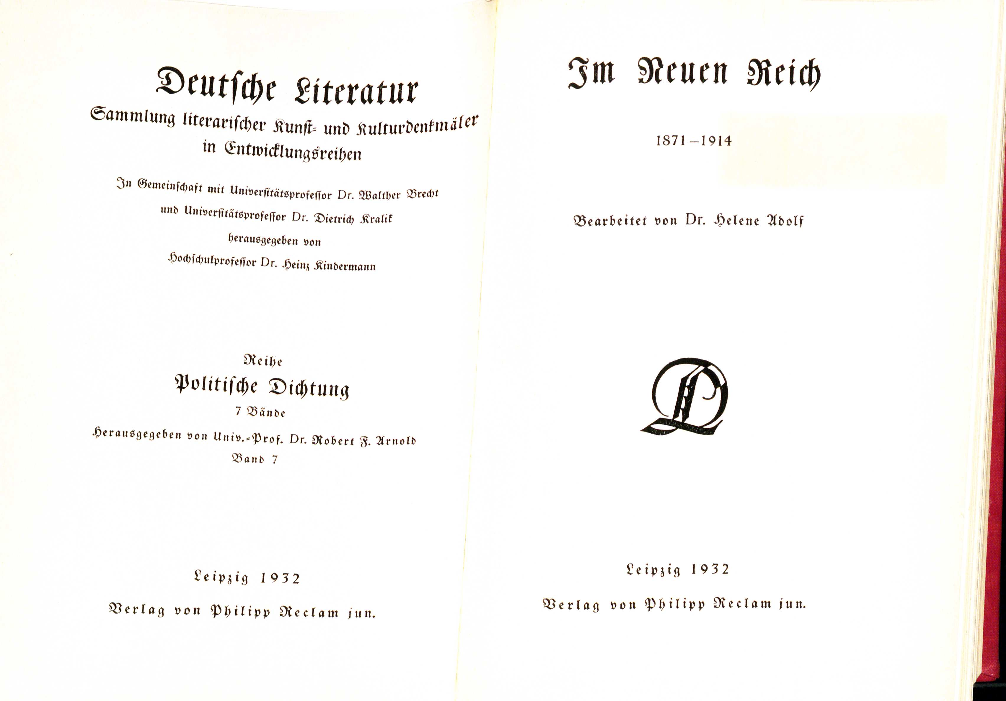 Helene Adolf Im neuen Reich 1932 Titel